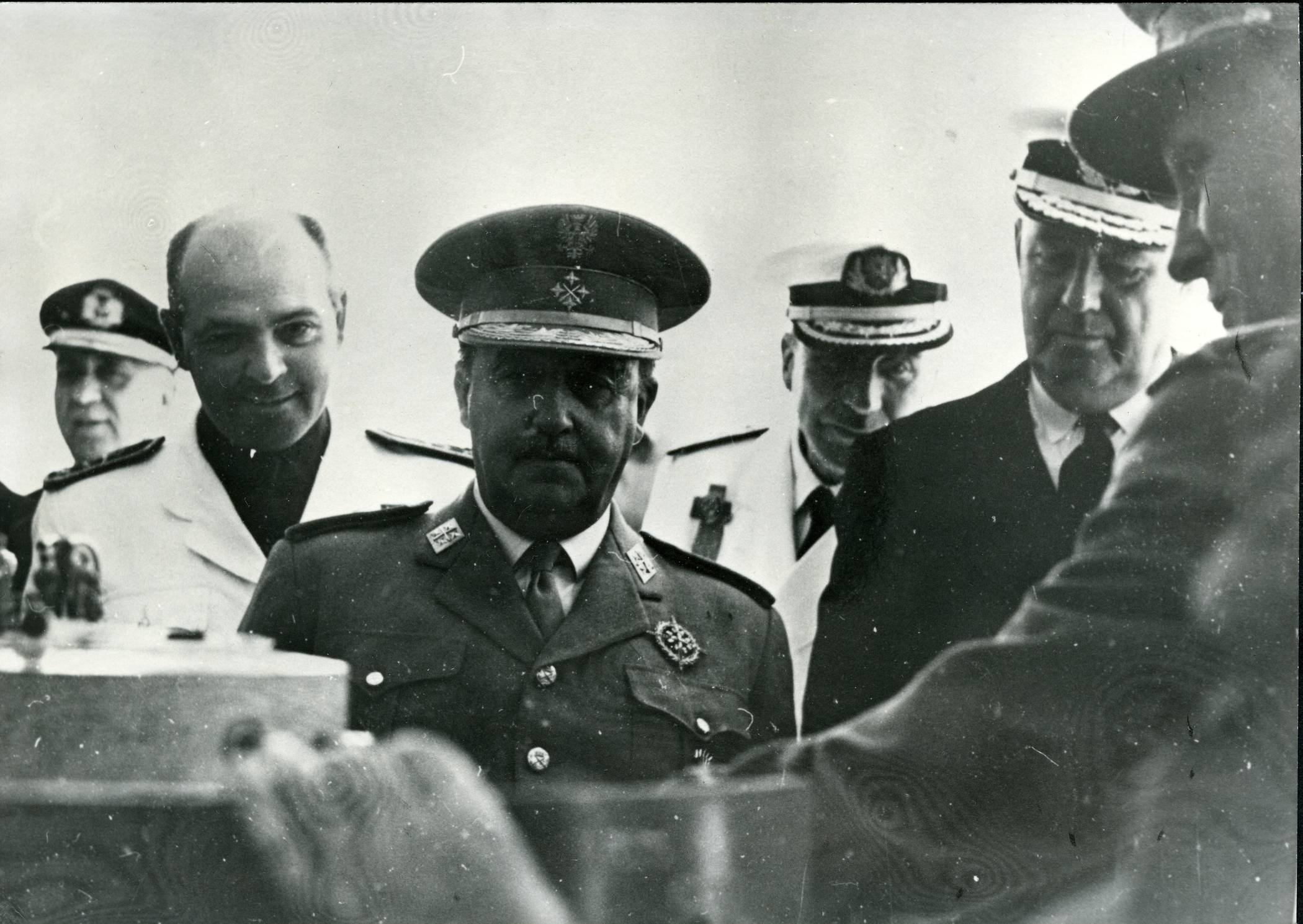 Personajes: Franco Bahamonde, Francisco El General Franco acompañado de otras autoridades militares asistiendo a las explicaciones sobre el cañon Vickers